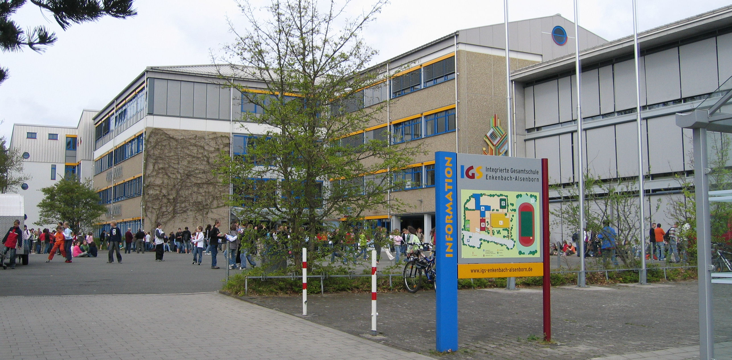 school building in Enkenbach, Germany